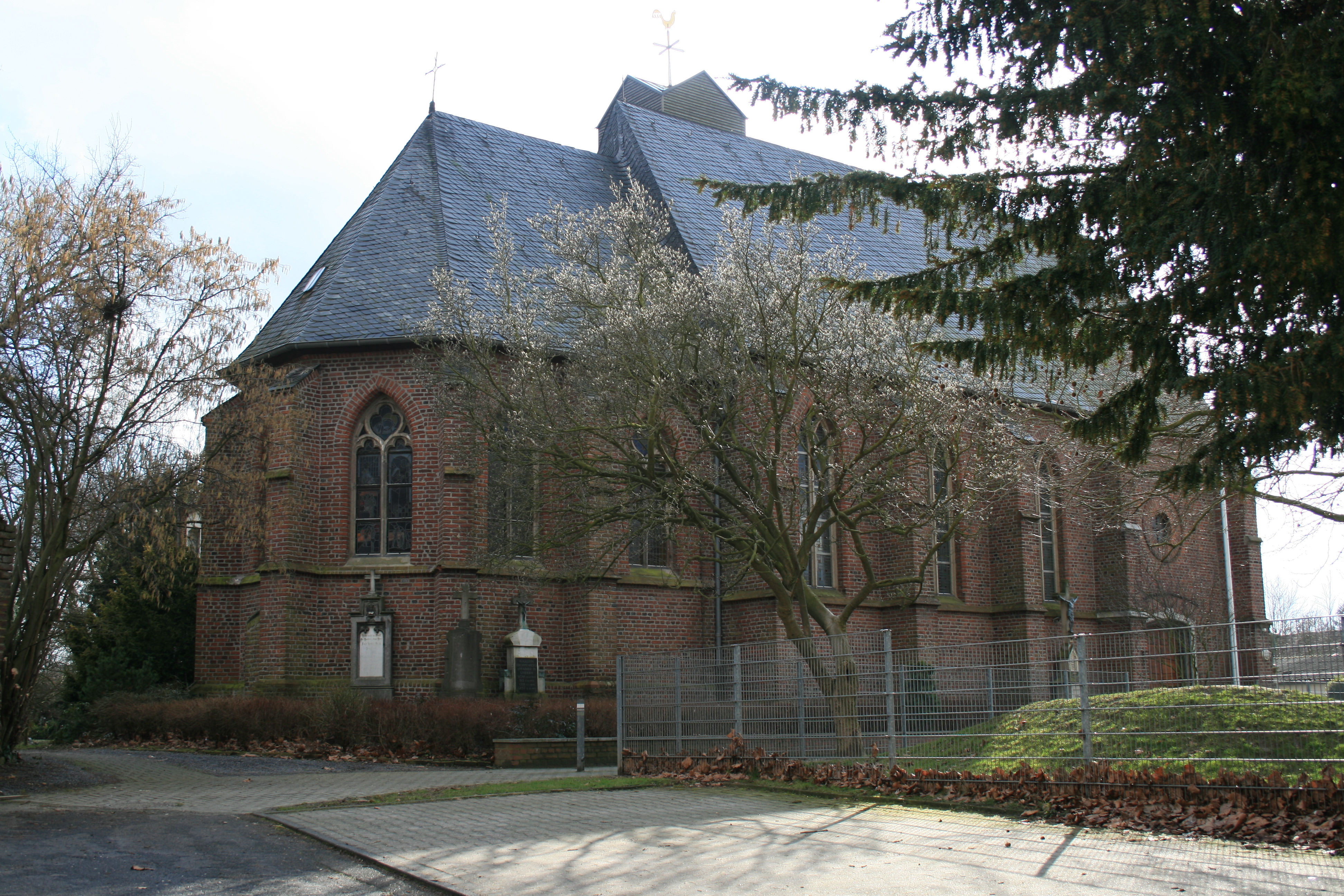 Pfarrkirche St. Johann Baptist in Lindern This is a photograph of an architectural monument.